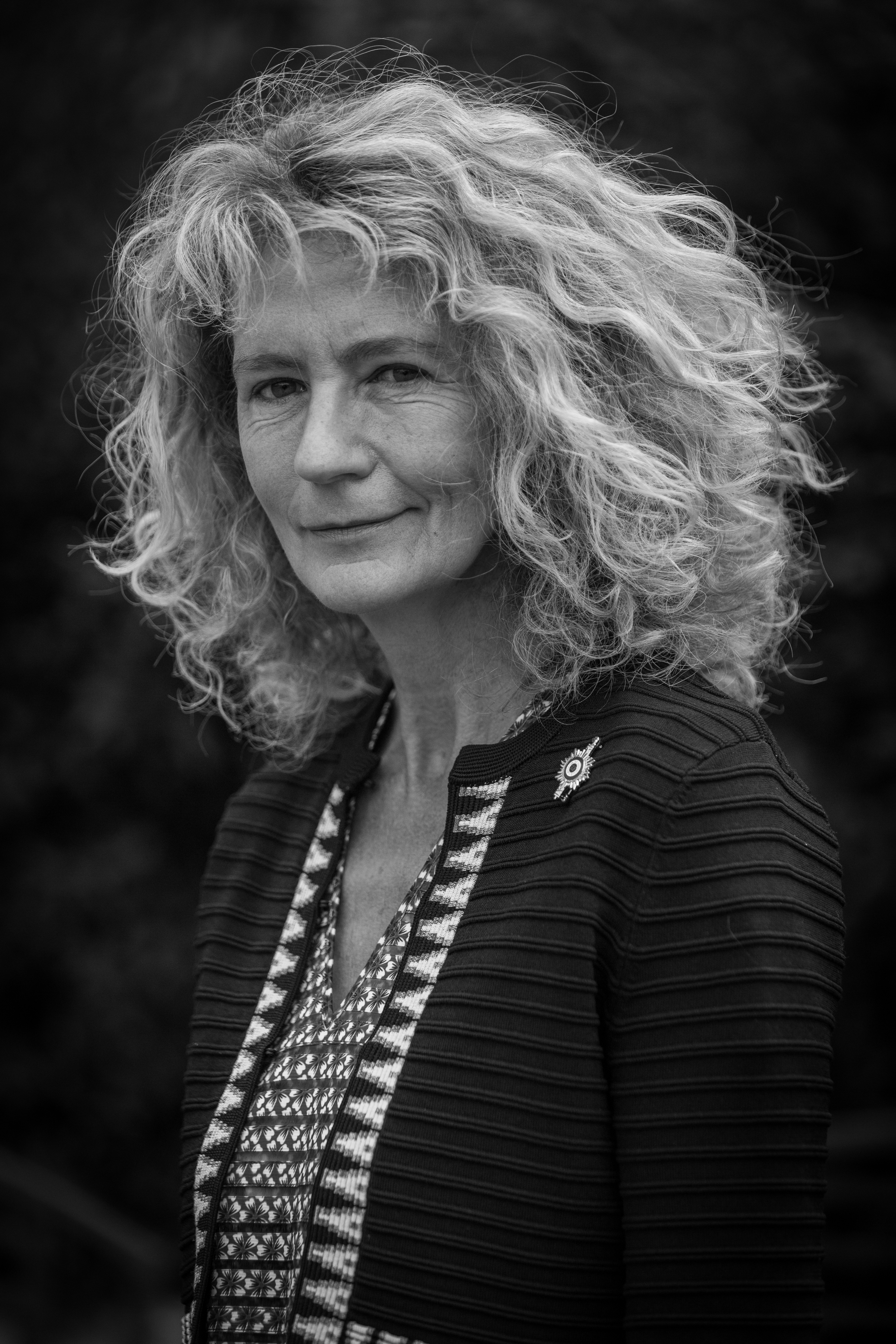 Martine Wonner, née le 27 mars 1964 à Hayange (Moselle), est un médecin psychiatre et une personnalité politique française. Elle est députée La République en Marche de la quatrième circonscription du Bas-Rhin.